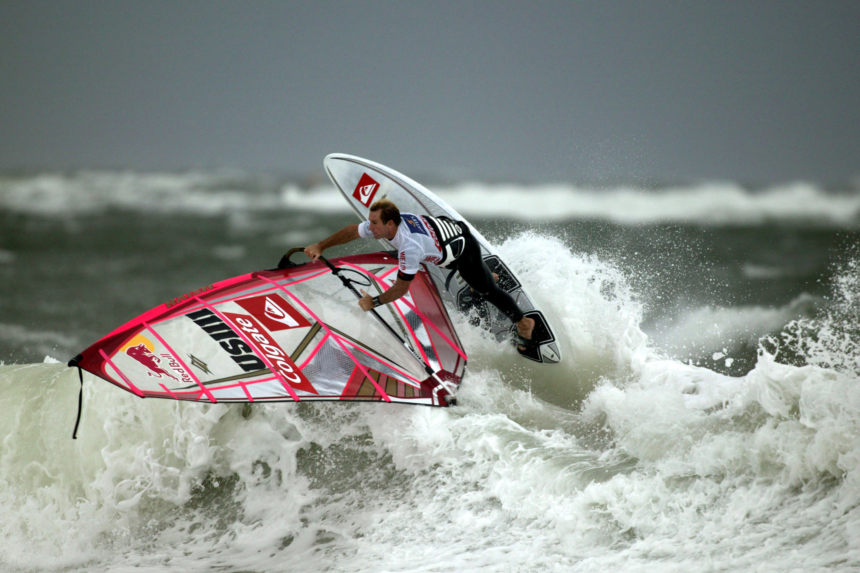 Robby Naish beim CWCS